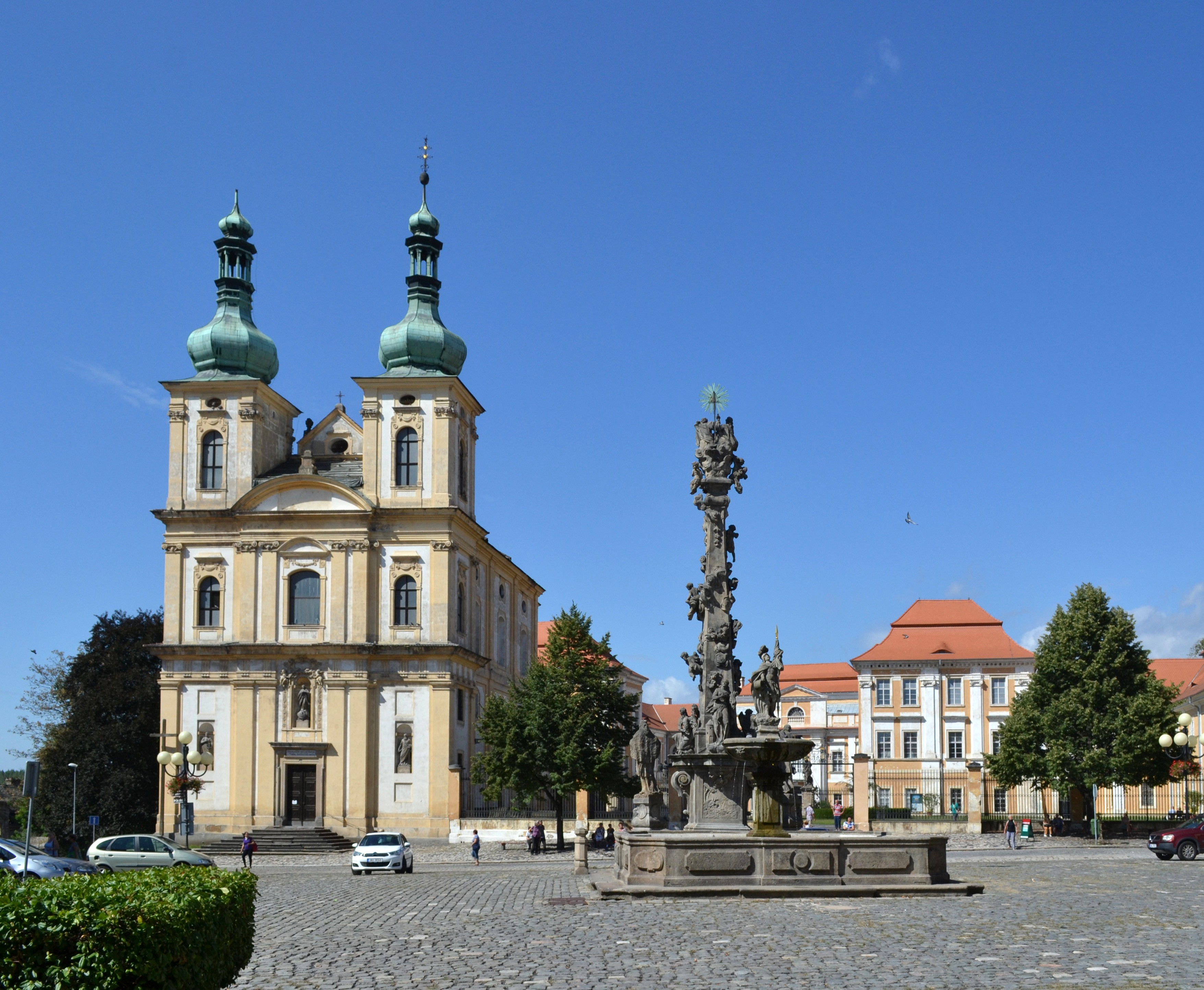 Duchcov - náměstí Republiky, kostel a zámek